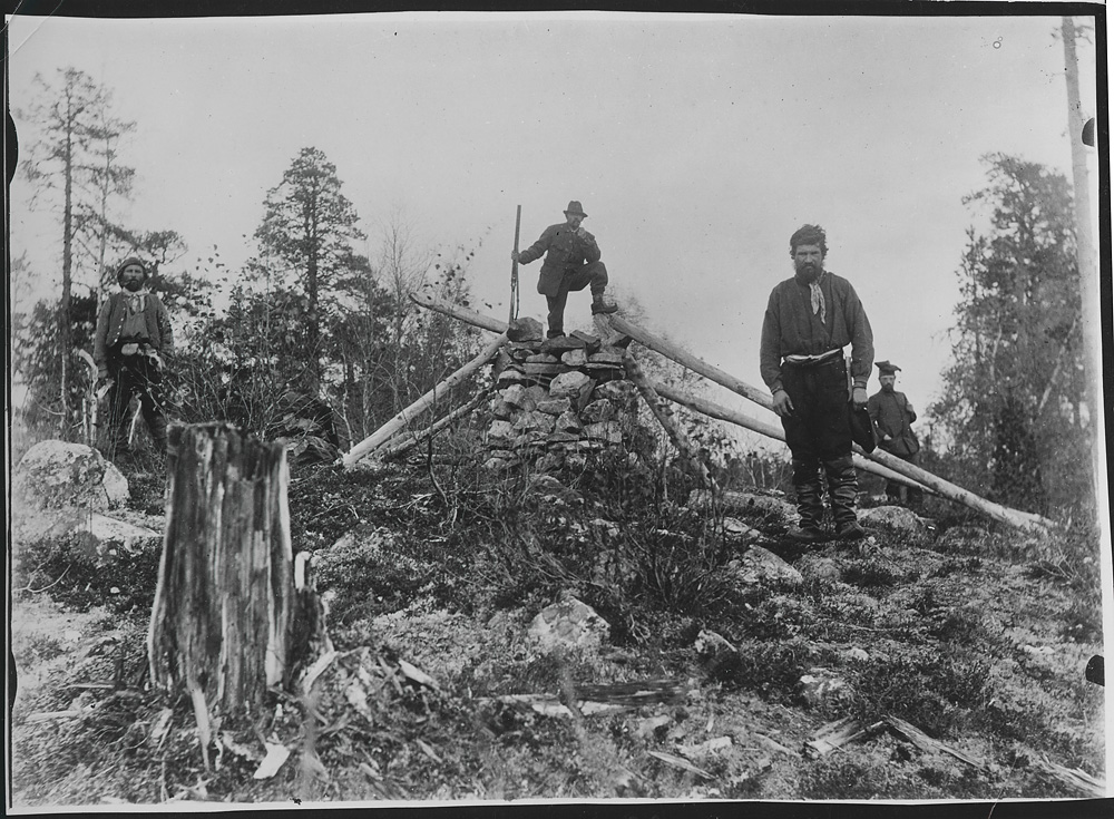 Wessel, Ellisif Rannveig Fire menn på Treriksrøysa. Grensen mellom Norge, Finland og Russland. NMFF.002143